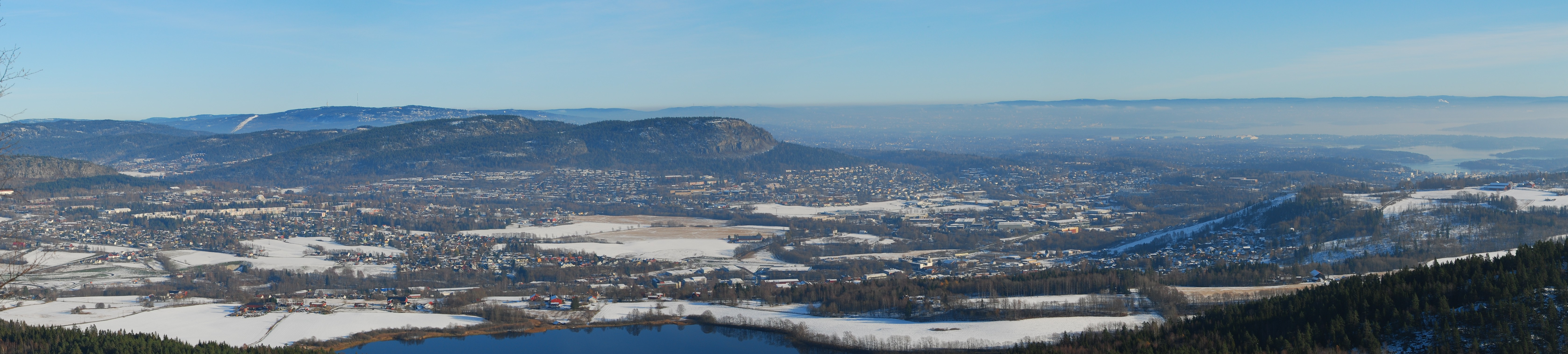 Utsikt fra Ramsåsen over vestre Bærum.